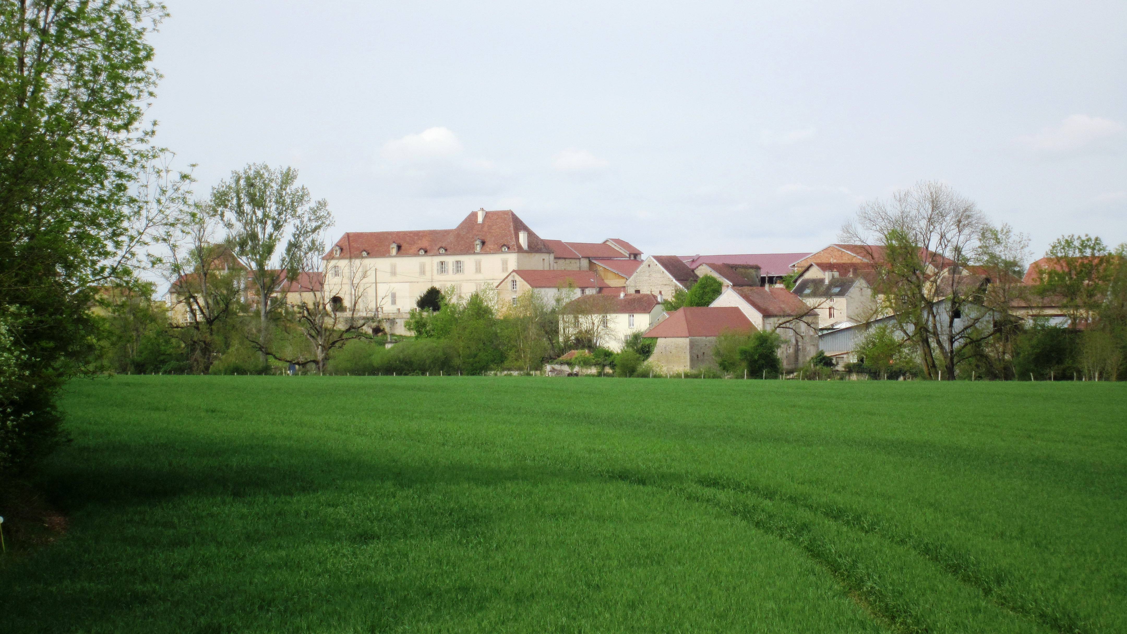 Village d'Etrochey (Côte-d'Or)